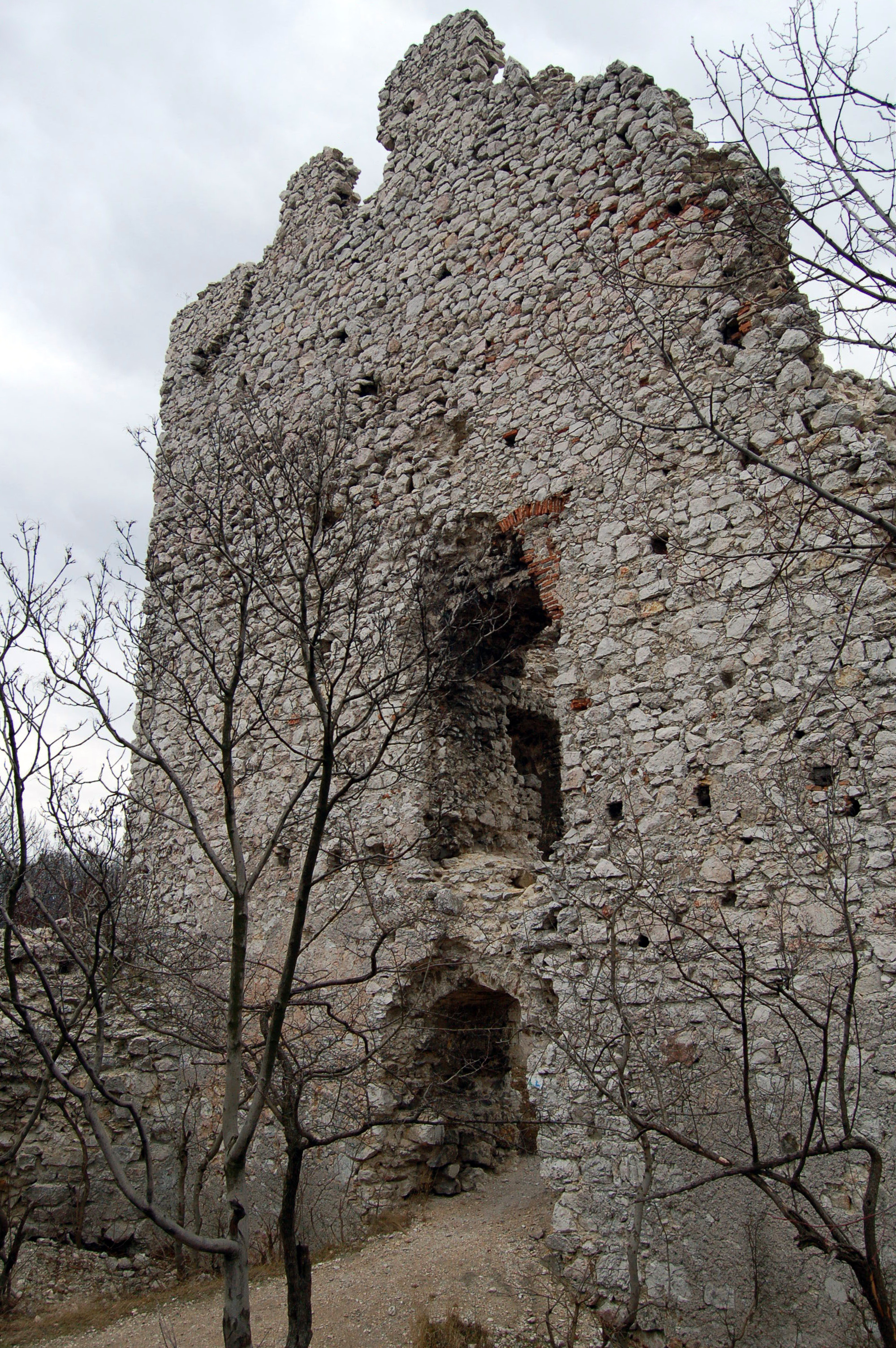 Vitányvár délkeleti lakótornya a várudvar felől.